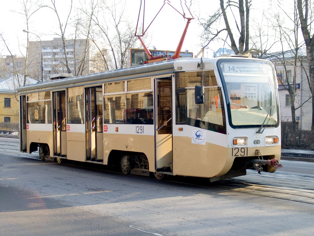 Трамвай модели 71-619К на улицах Москвы.